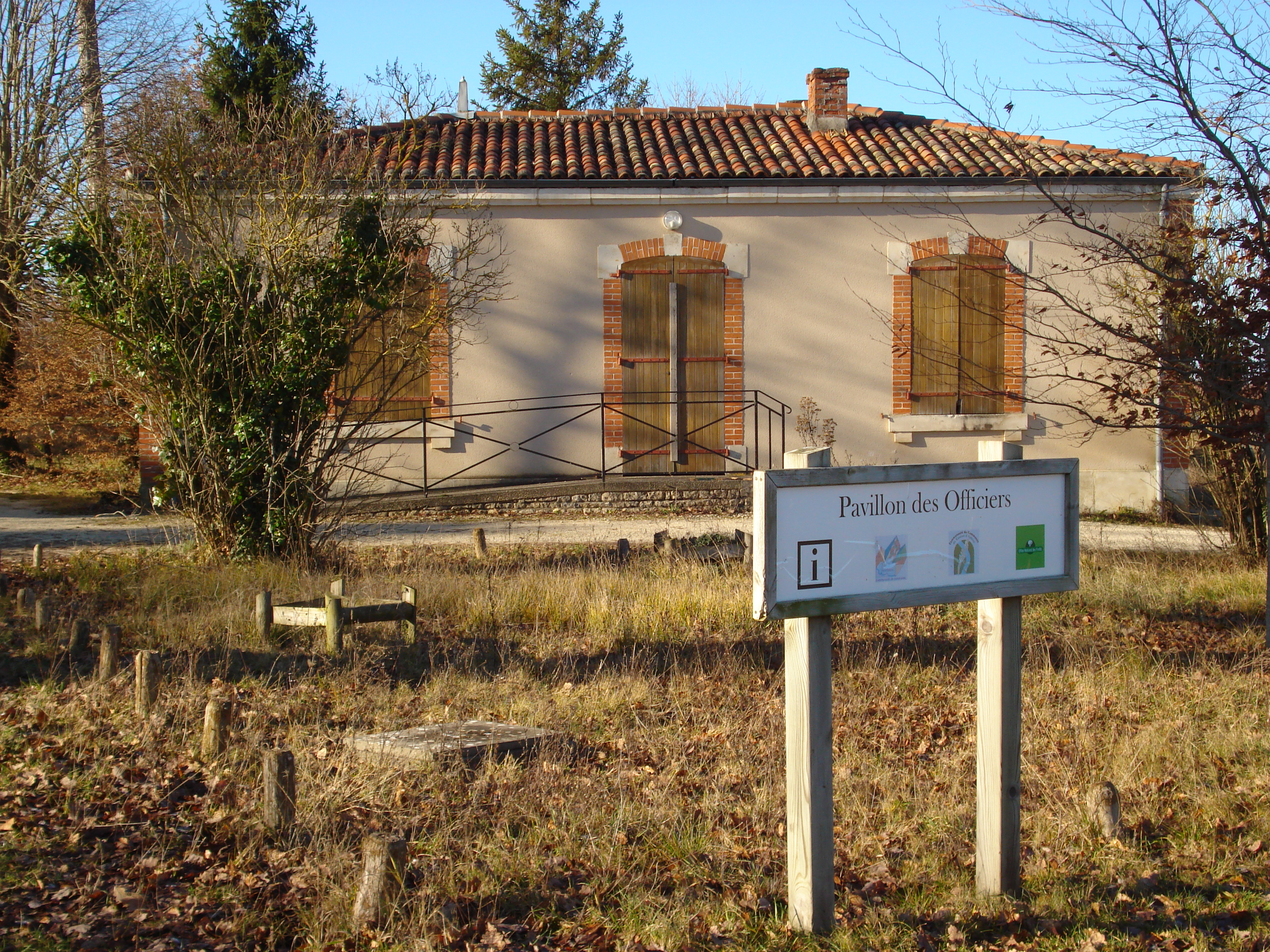 Une des deux habitations construites sur le rond-point de la forêt d'Aulnay